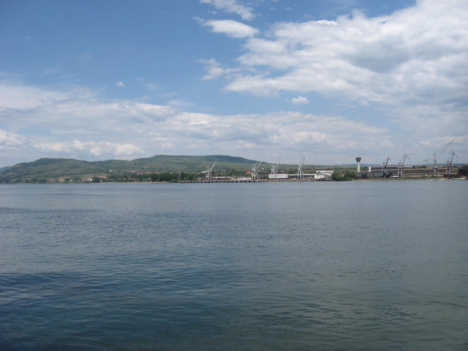 Драган Цветковић сопствена слика Кладово Дунав Licensing